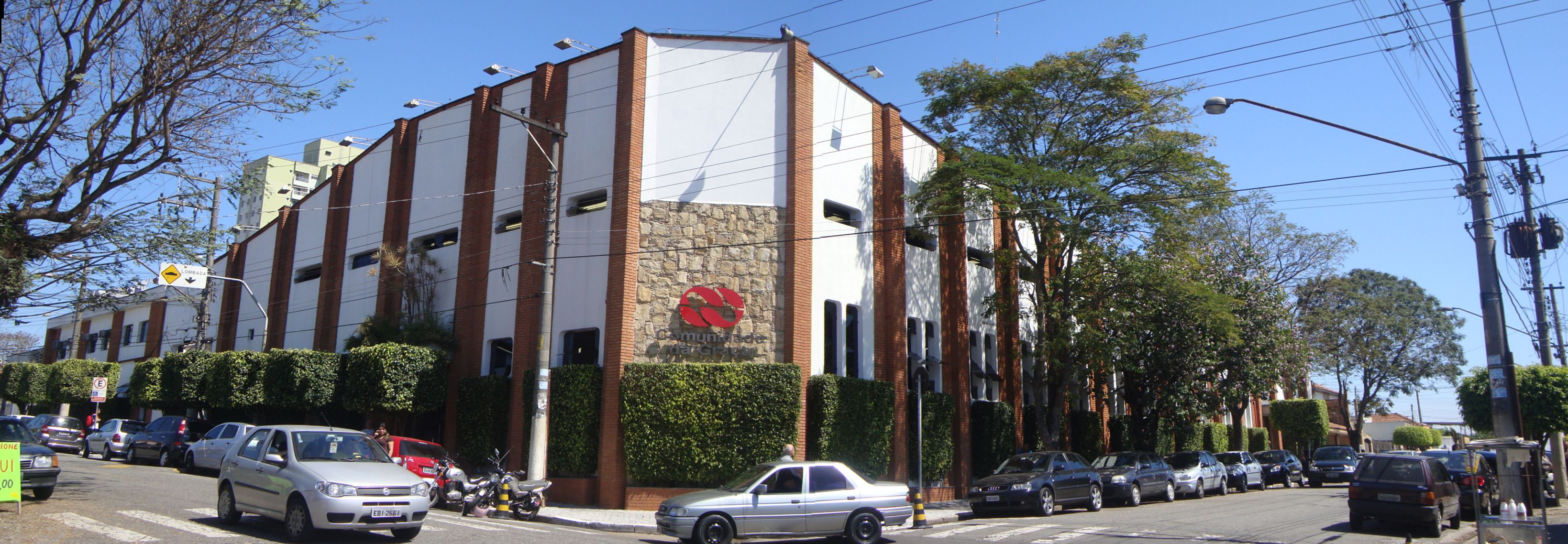 Panorama da Sede Internacional da Comunidade da Graça, localizada em Vila Carrão, bairro da Zona Leste paulistana